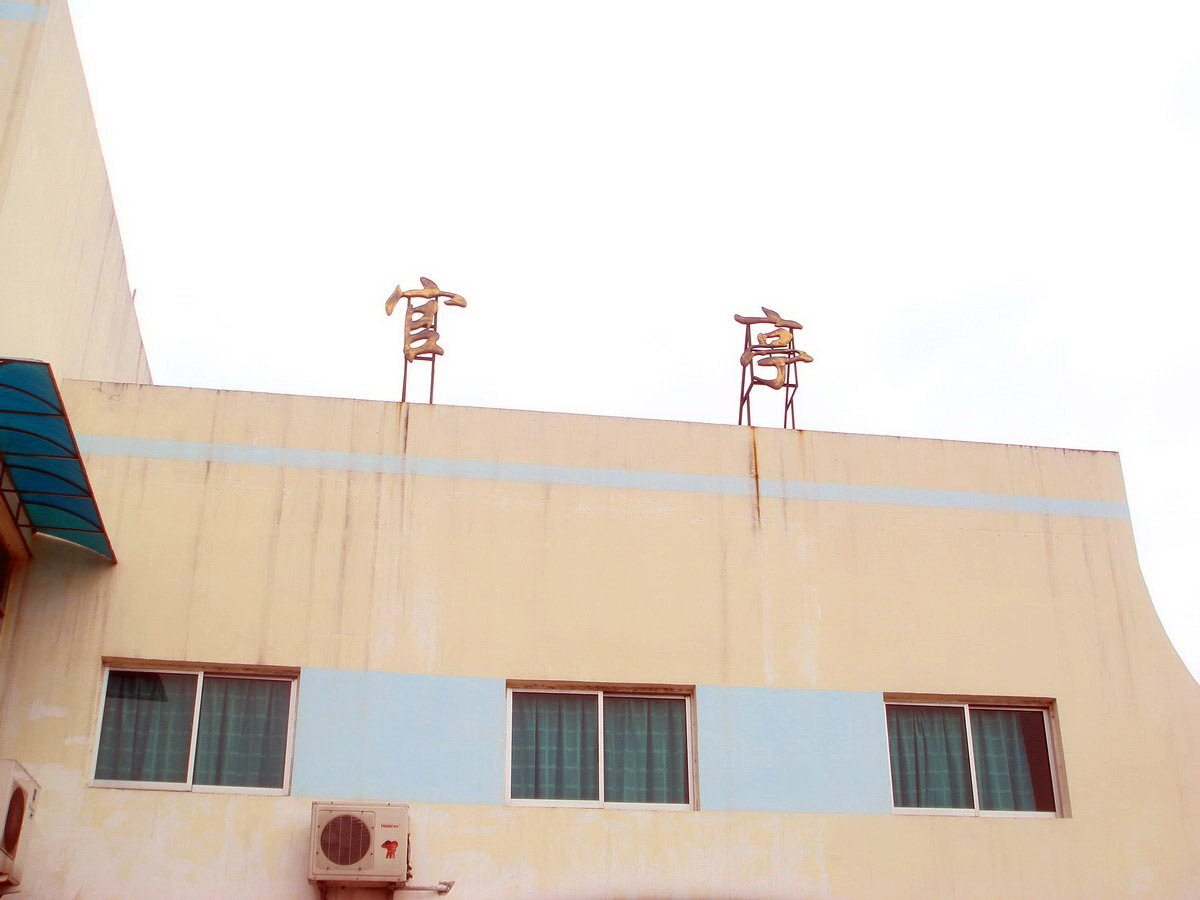 中文（中国大陆）: 2007年，官亭镇站